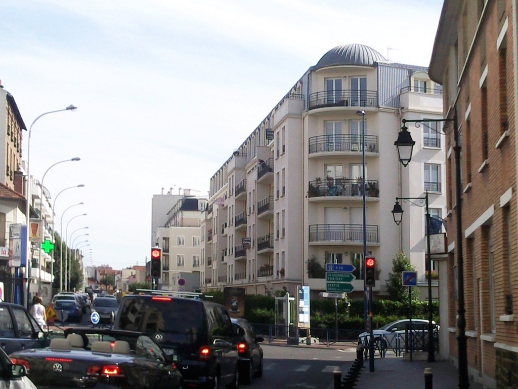 Immeuble dans le centre-ville de Drancy, emplacement de l'ancien collège Paul Bert.